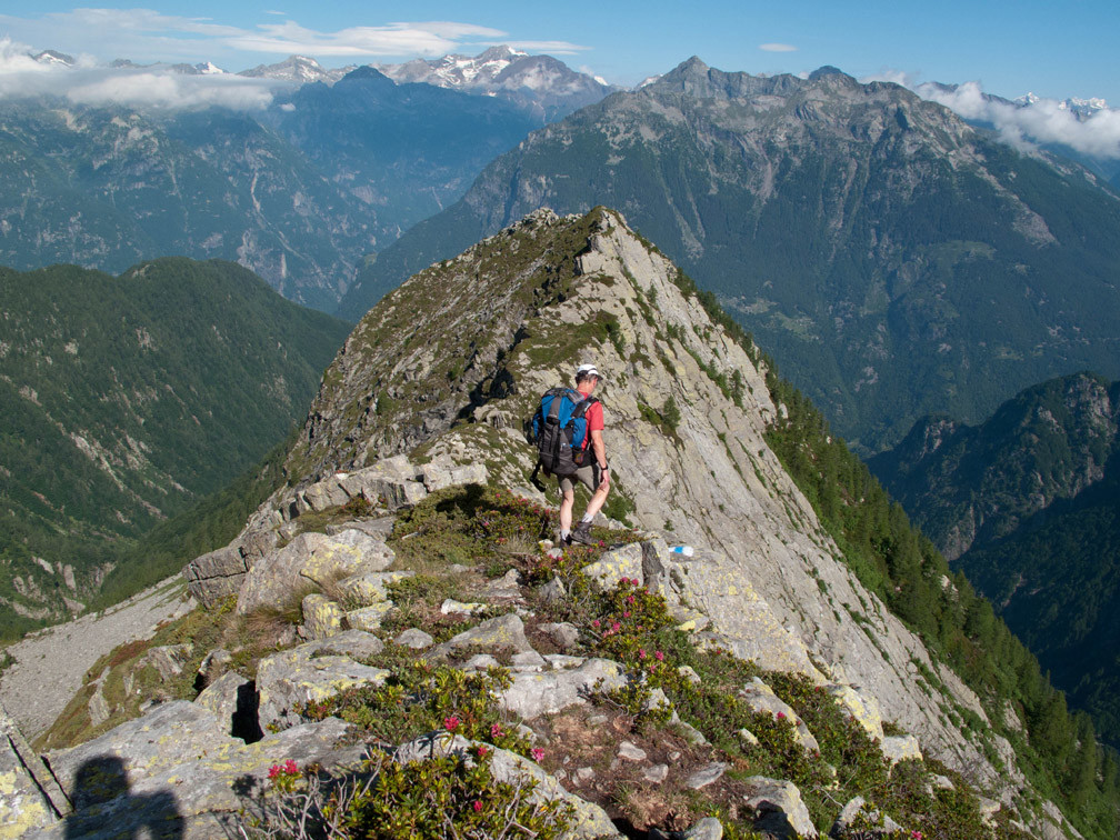 Via Alta Vallemaggia, TI, Schweiz, 3. Etappe